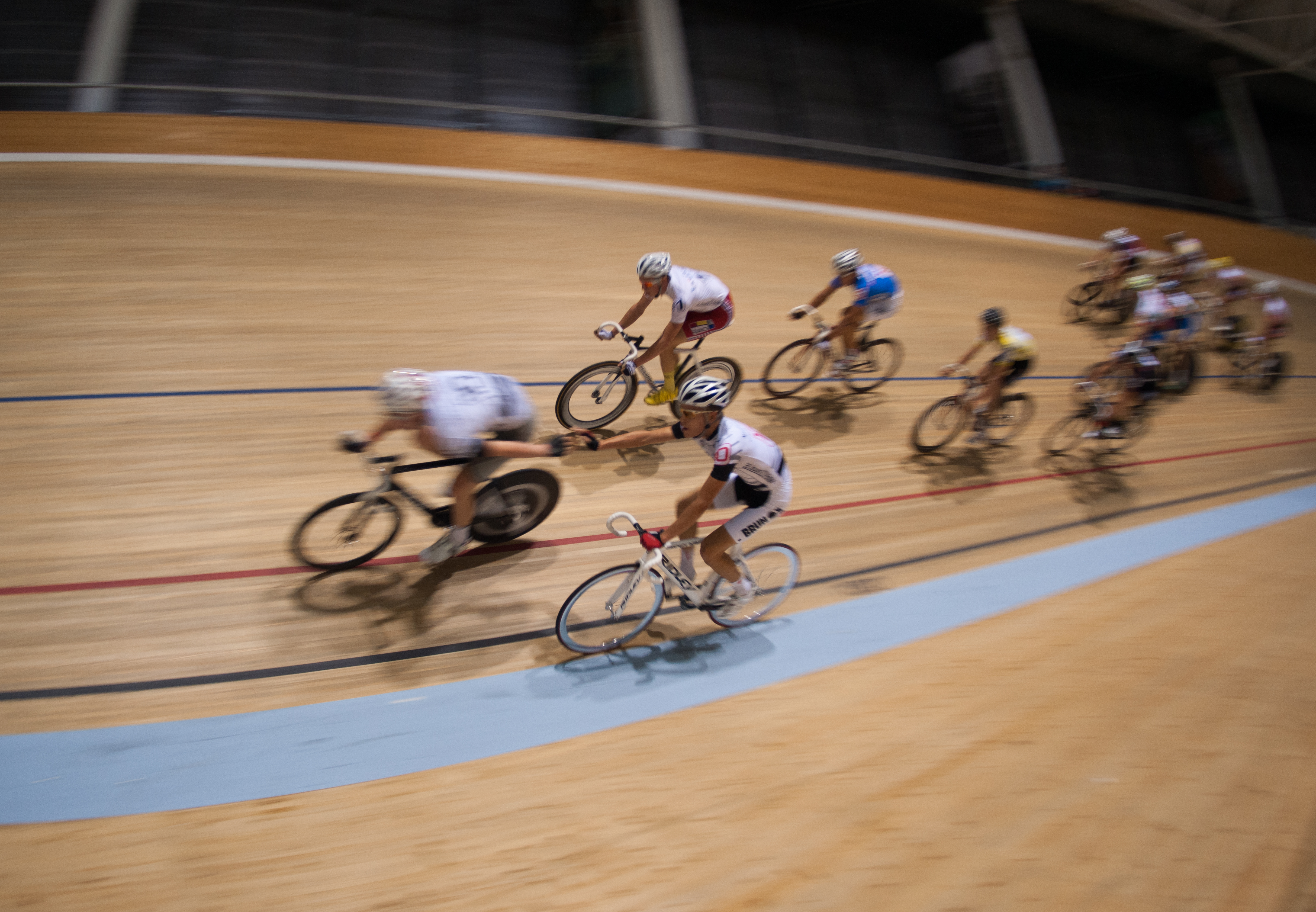 Trois jours cyclistes d'Aigle, en 2013 ; course à l'américaine